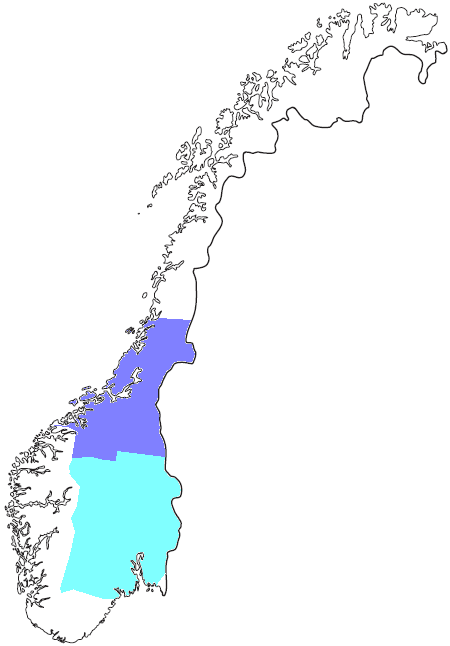 Utbreiing av kløyvd infinitiv i norske dialektar. Det lyseblå området har infinitiv på -e i overvektsord og -a i jamvektsord, det mørkeblå området apokope i overvektsord og mykje jamning i jamvektsord. Kartet viser kva for norske dialektar som har spor av jamvektsregelen. I det lyseblå området har overvektsord endinga -e, medan jamvektsord har endinga -a. I det mørkeblå området har overvektsord apokope, medan det er utstrakt bruk av jamning i jamvektsord.